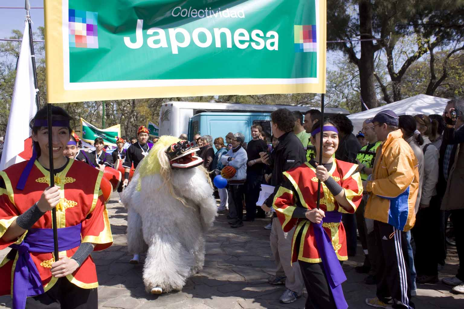 Dia del inmigrante 033